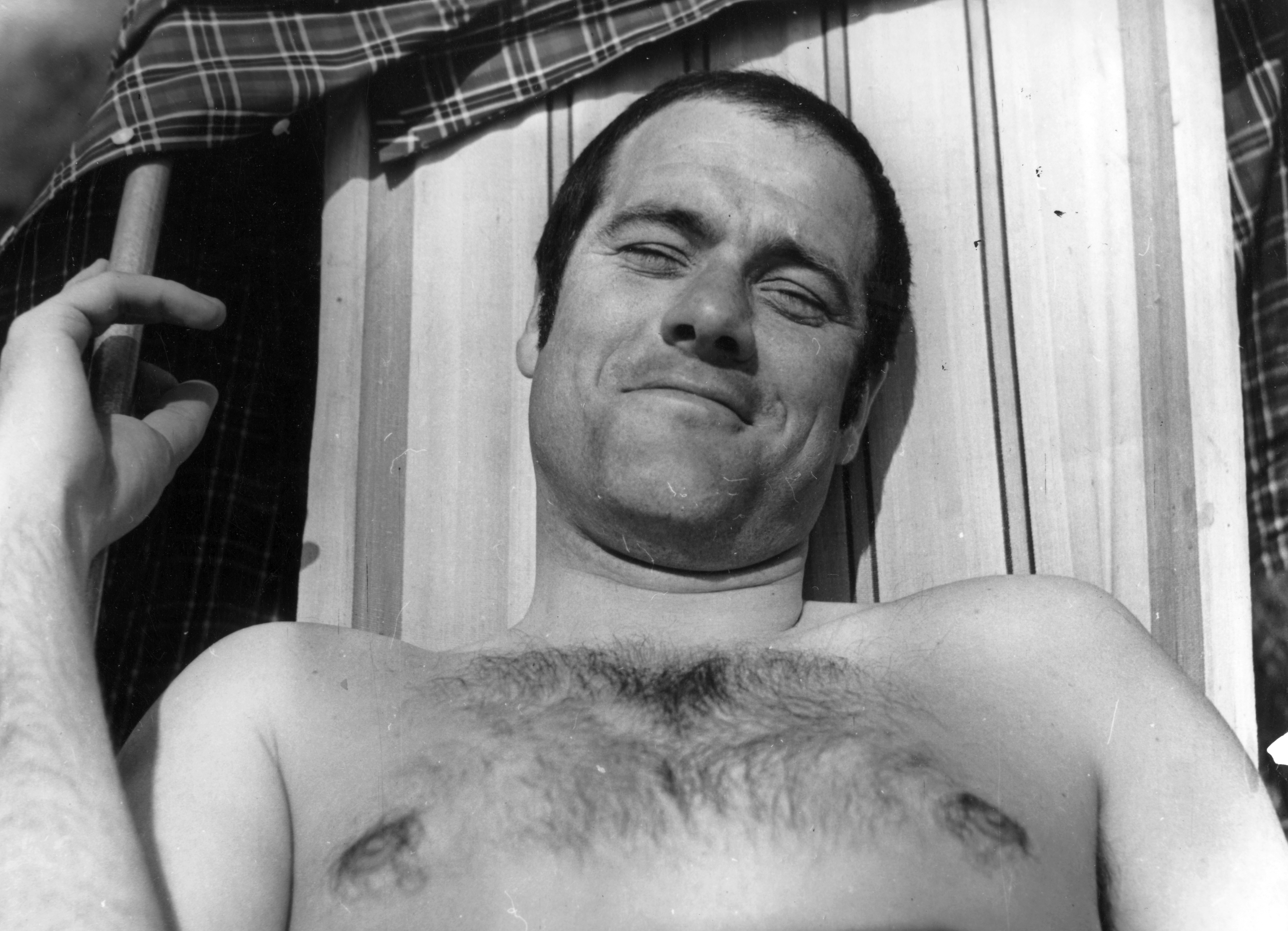 Andor Tamás operatőr. A kép a Tiszazug című film forgatásakor készült. Location: Hungary Tags: filming, hairy chest, grimace Title: Andor Tamás operatőr. A kép a Tiszazug című film forgatásakor készült.